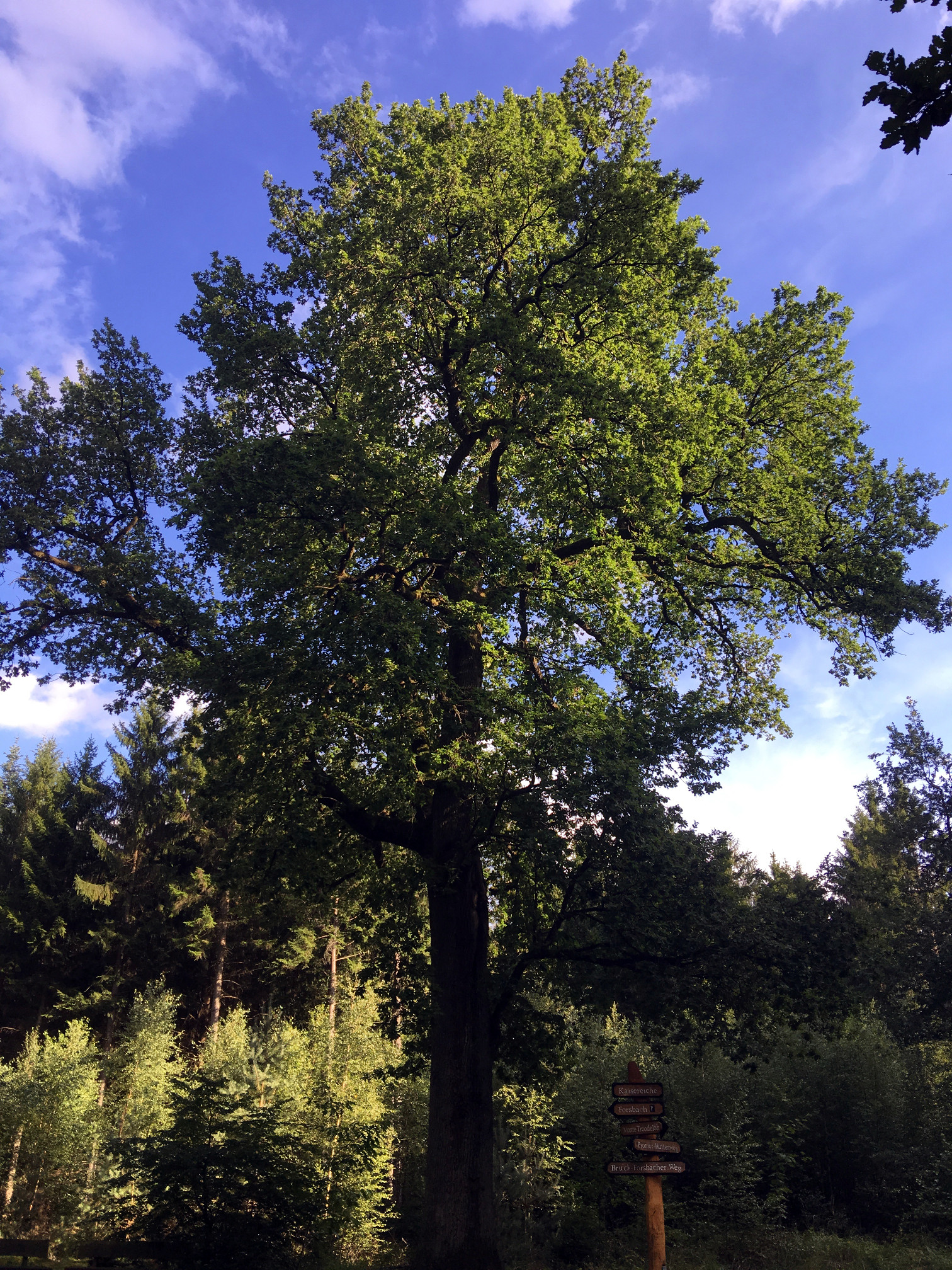 Kaisereiche westlich des ehemaligen Bahnhofs Forsbach im Naturschutzgebiet „Königsforst“ (NSG GL-038) im Stadtgebiet Bergisch Gladbach